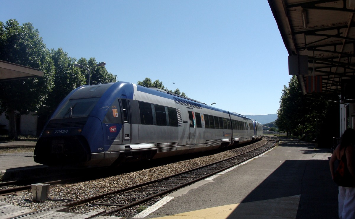 Une rame TER Marseille -Briançon (deux X72500 en UM) en gare de Veynes-Dévoluy.